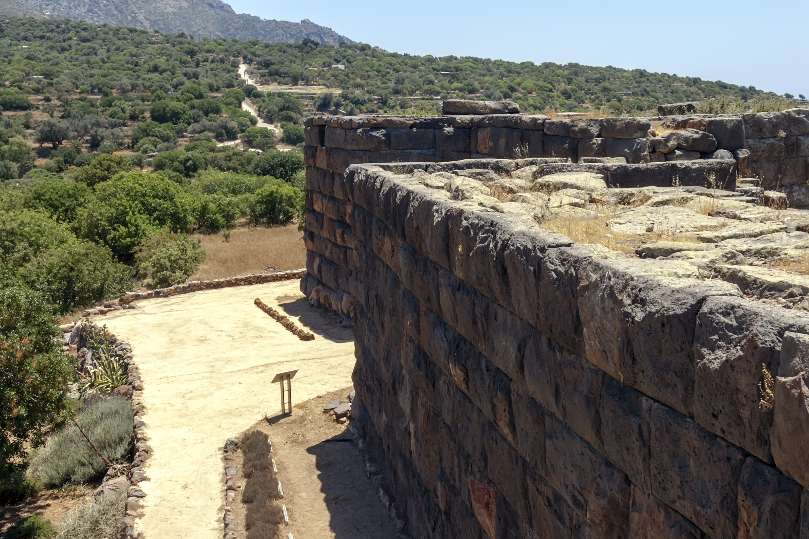 Древняя крепость на острове Нисирос.